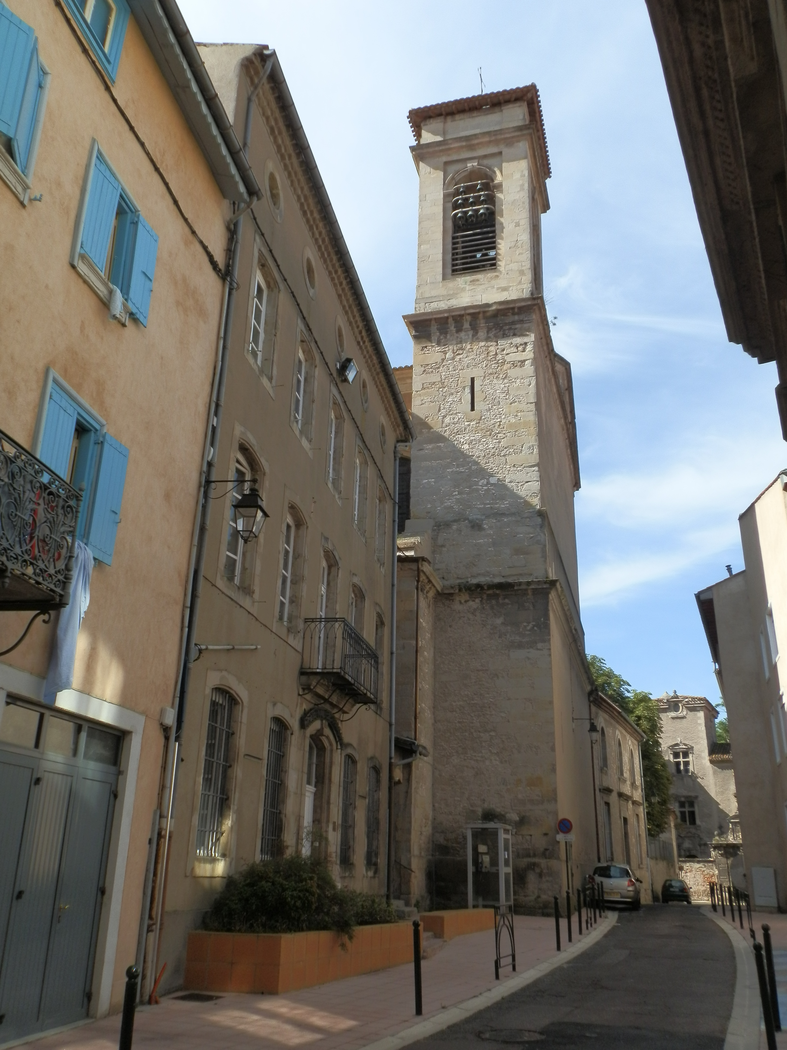 Église Notre-Dame-de-la-Platé de Castres, 32 rue Victor Hugo (Classé, 1987) .